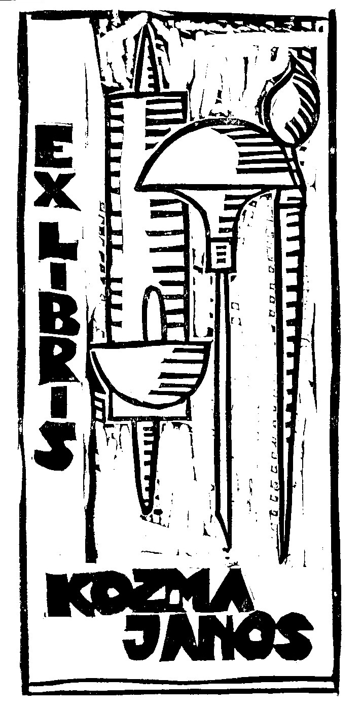 Exlibris az én könyvem